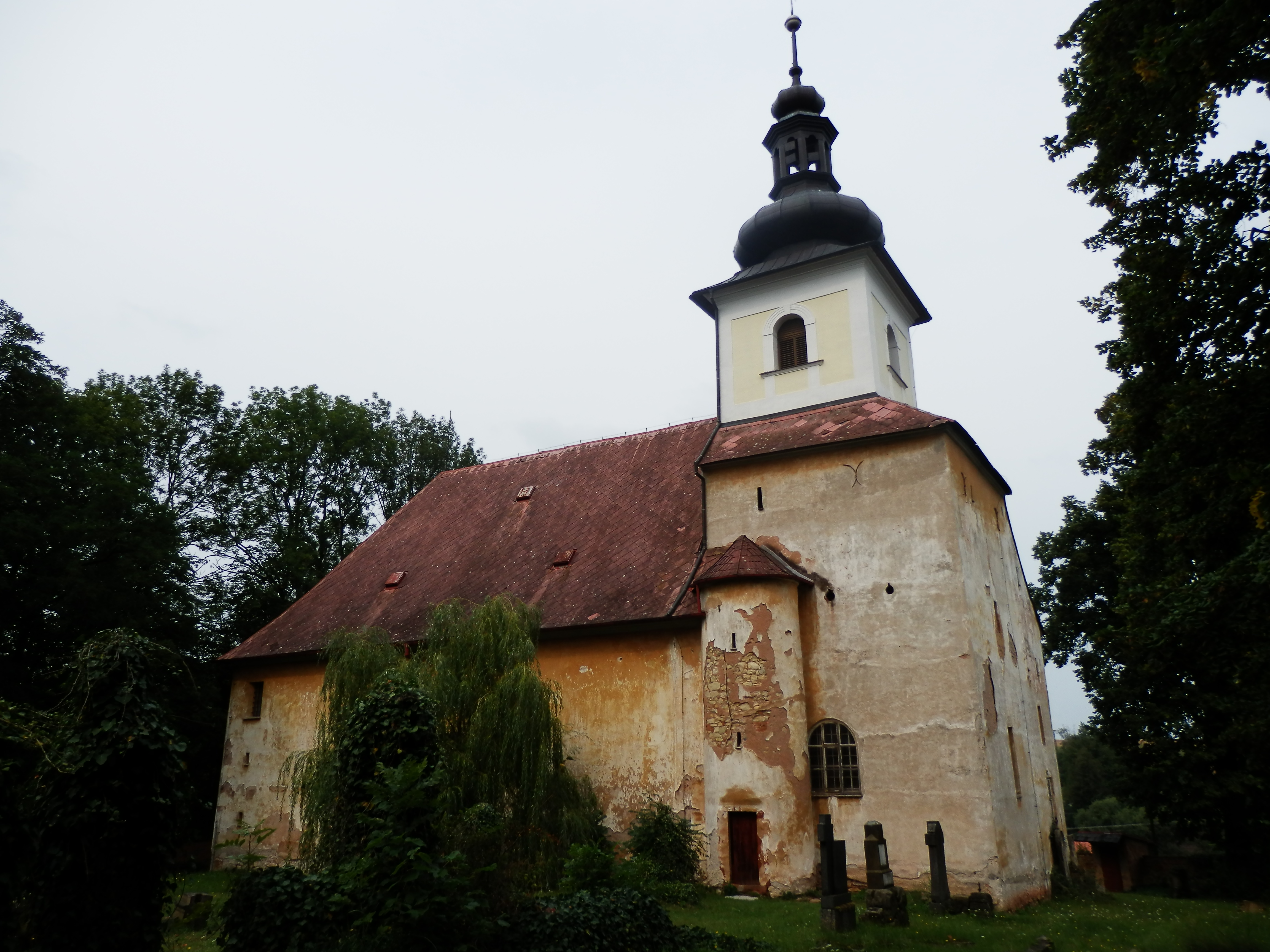 Kostel sv. Anny (Boršov), Boršov